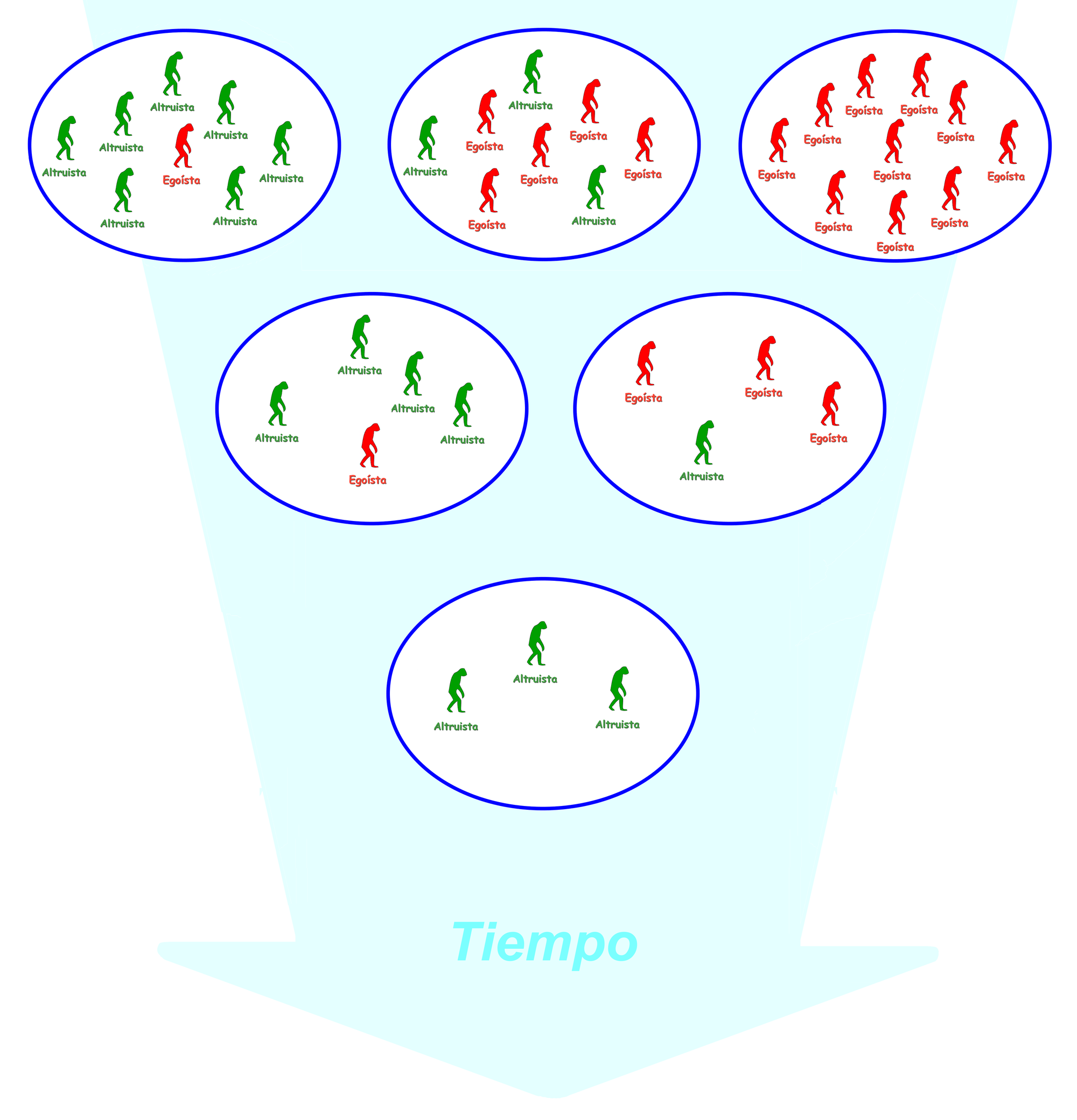 Representación de la teoría de «selección de grupos», en virtud de la cual los grupos humanos donde existían más individuos dispuestos a sacrificar su vida por los demás sobrevivían, promoviendo de este modo el «acervo genético altruista». Es una teoría que, aunque es defendida por algunos biólogos, contradice a la teoría de la evolución de Darwin.